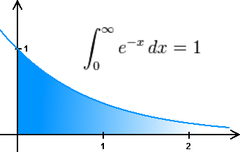 Improprius integrál végtelen hosszú görbe alatti területként